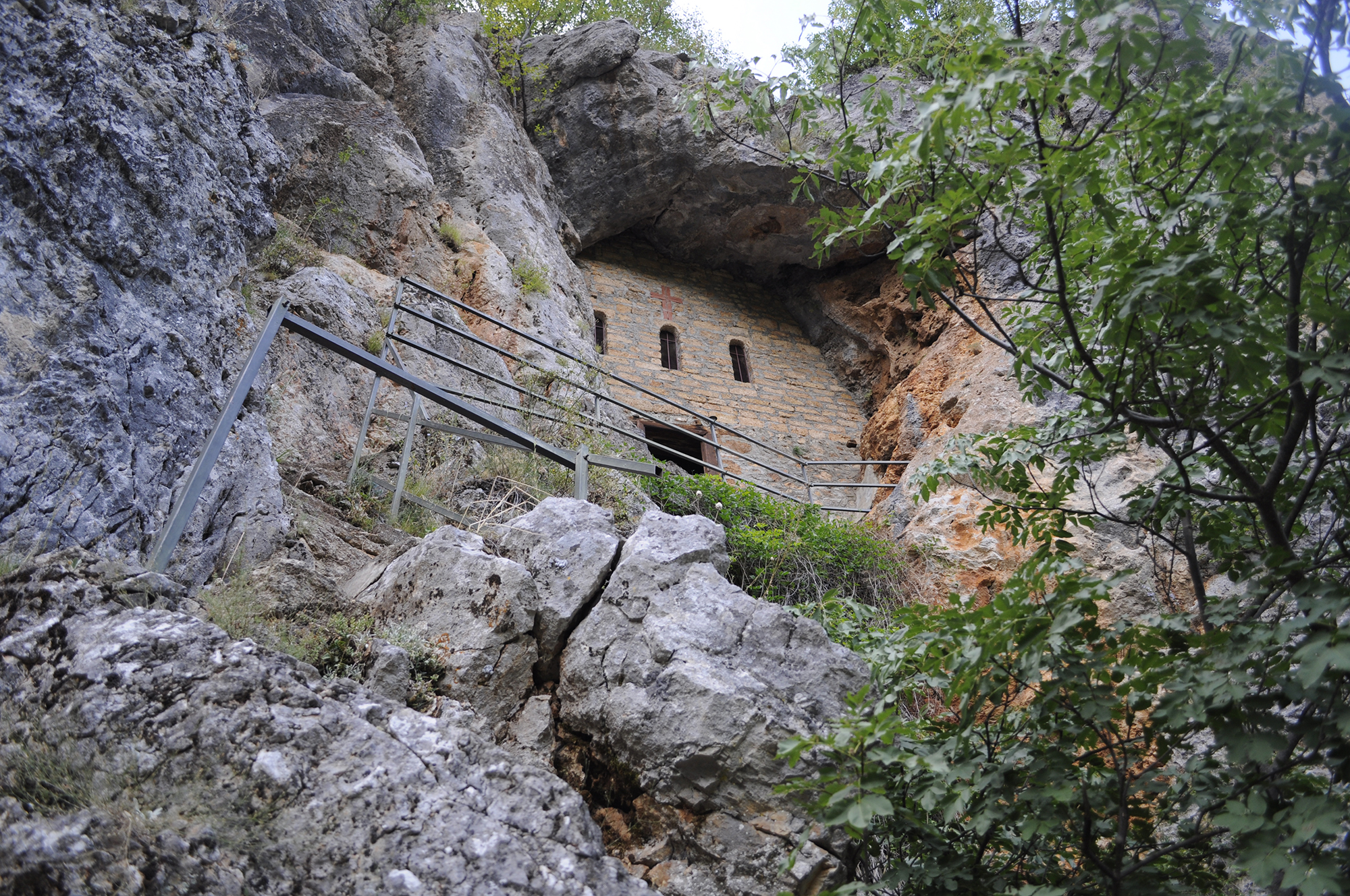 Пештерската црква Свети Спас во Вишни